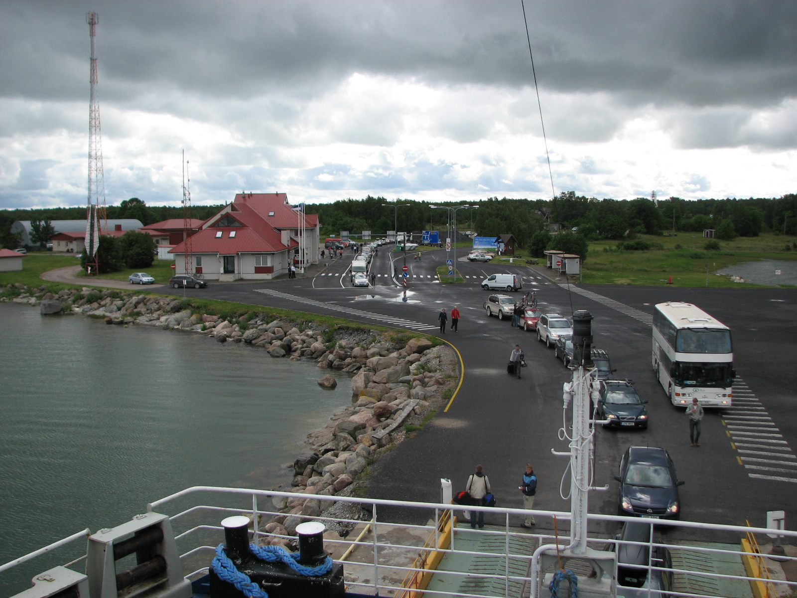 Port of Heltermaa, Hiiumaa, Estonia